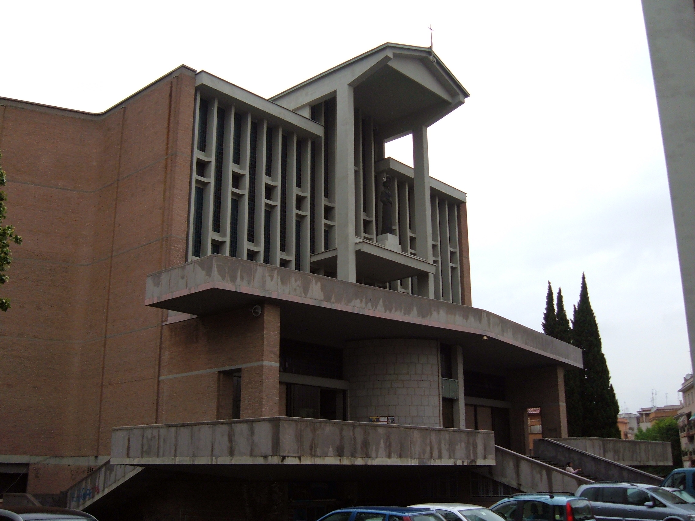 Chiesa di Nostra Signora de La Salette, a Roma, nel quartiere Gianicolense.